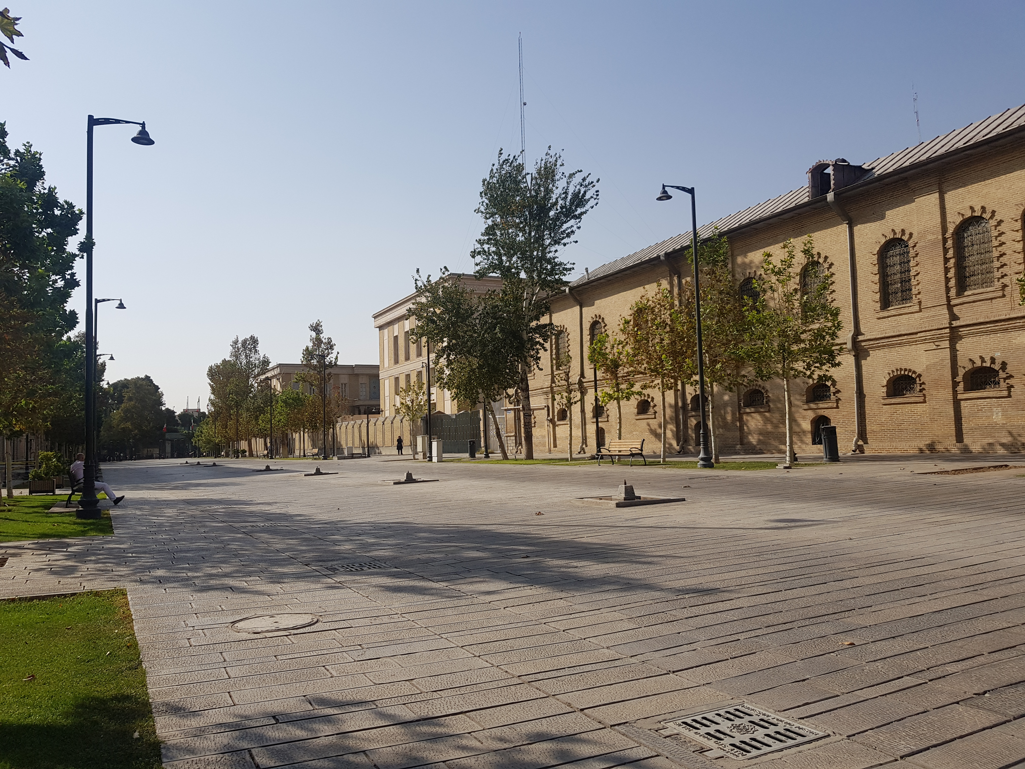 قسمت غربی خیابان کوشک از مجموعه میدان مشق